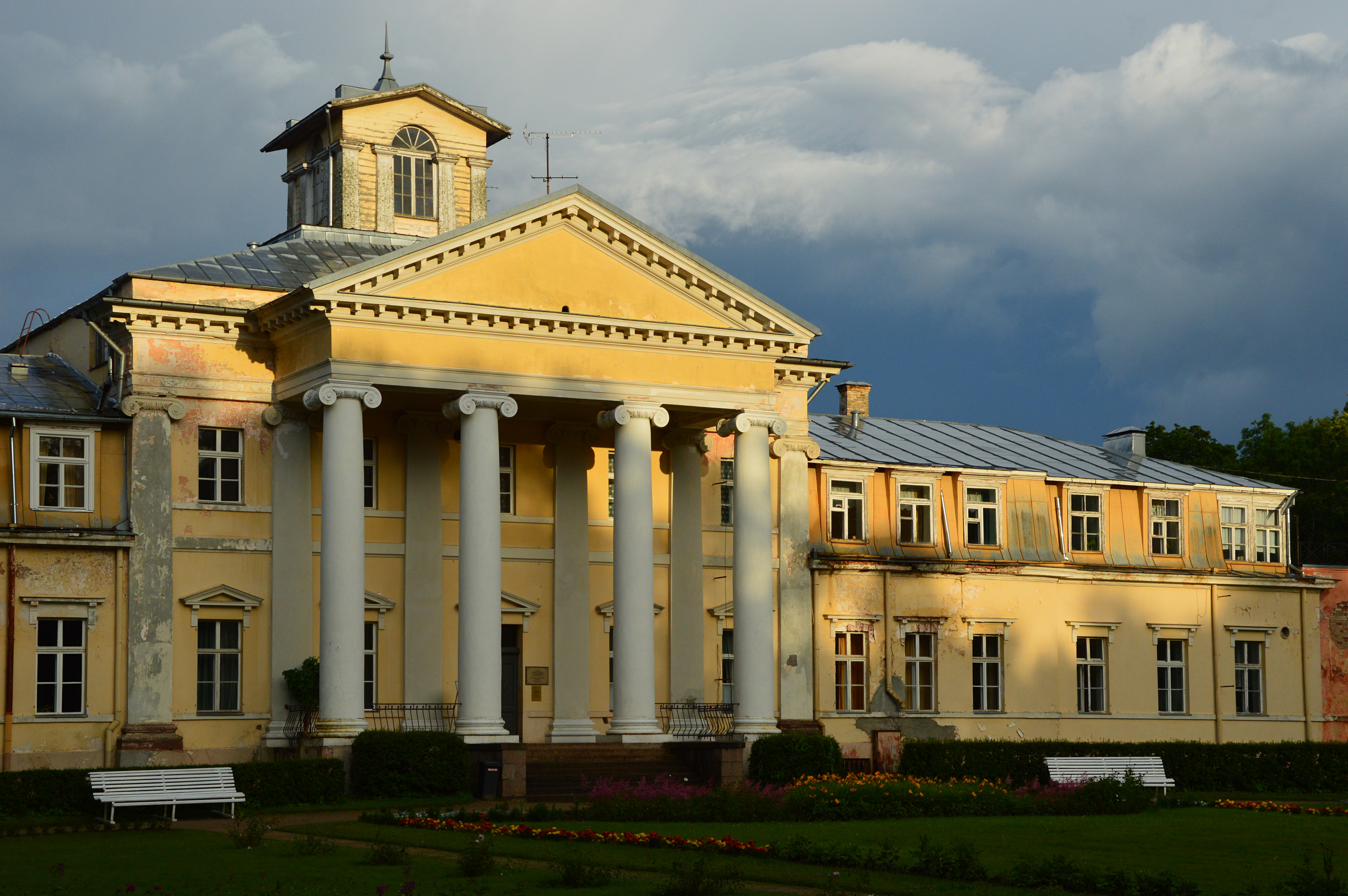 Krimulda mõisa peahoone.